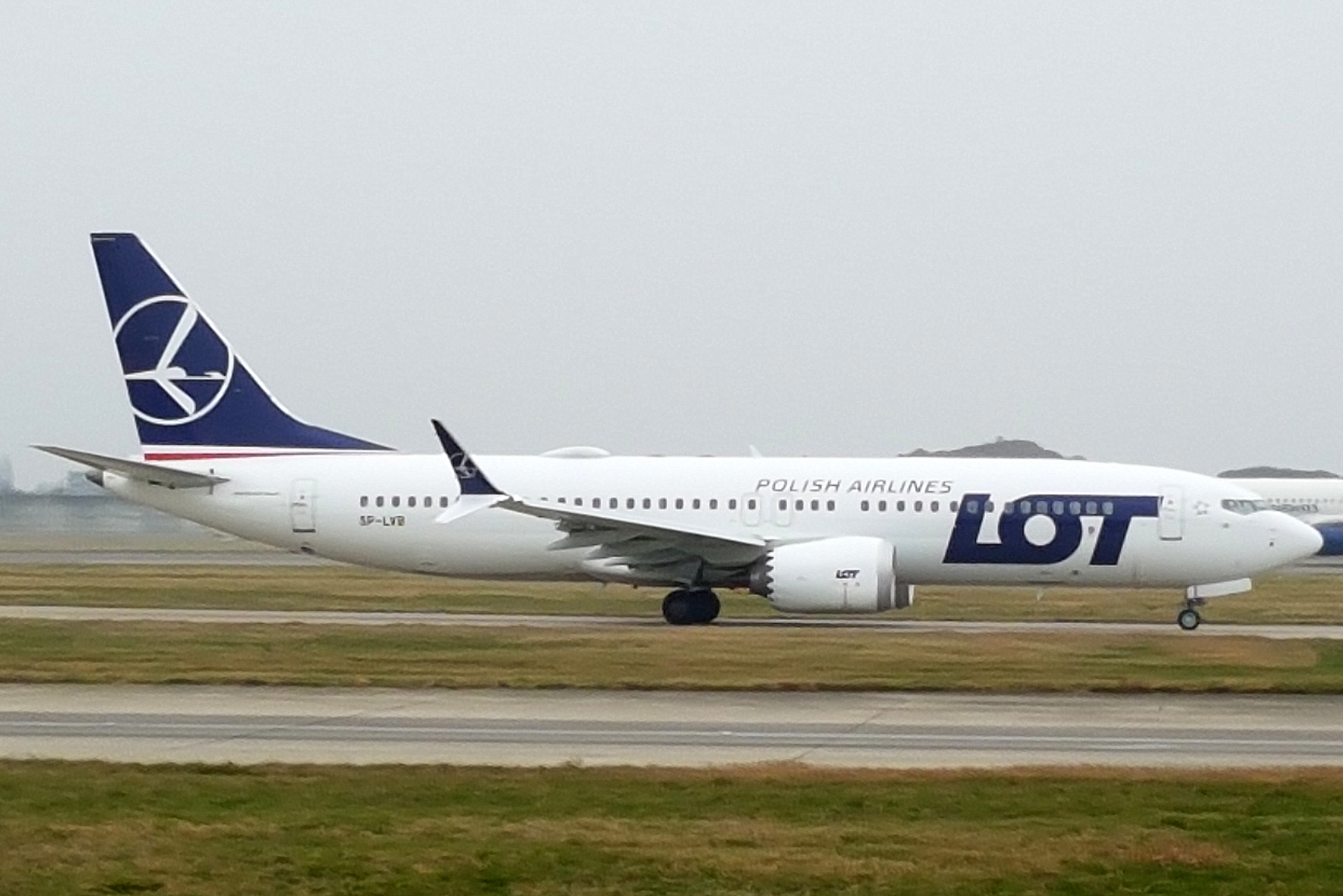 SP-LVB 09012018LHR